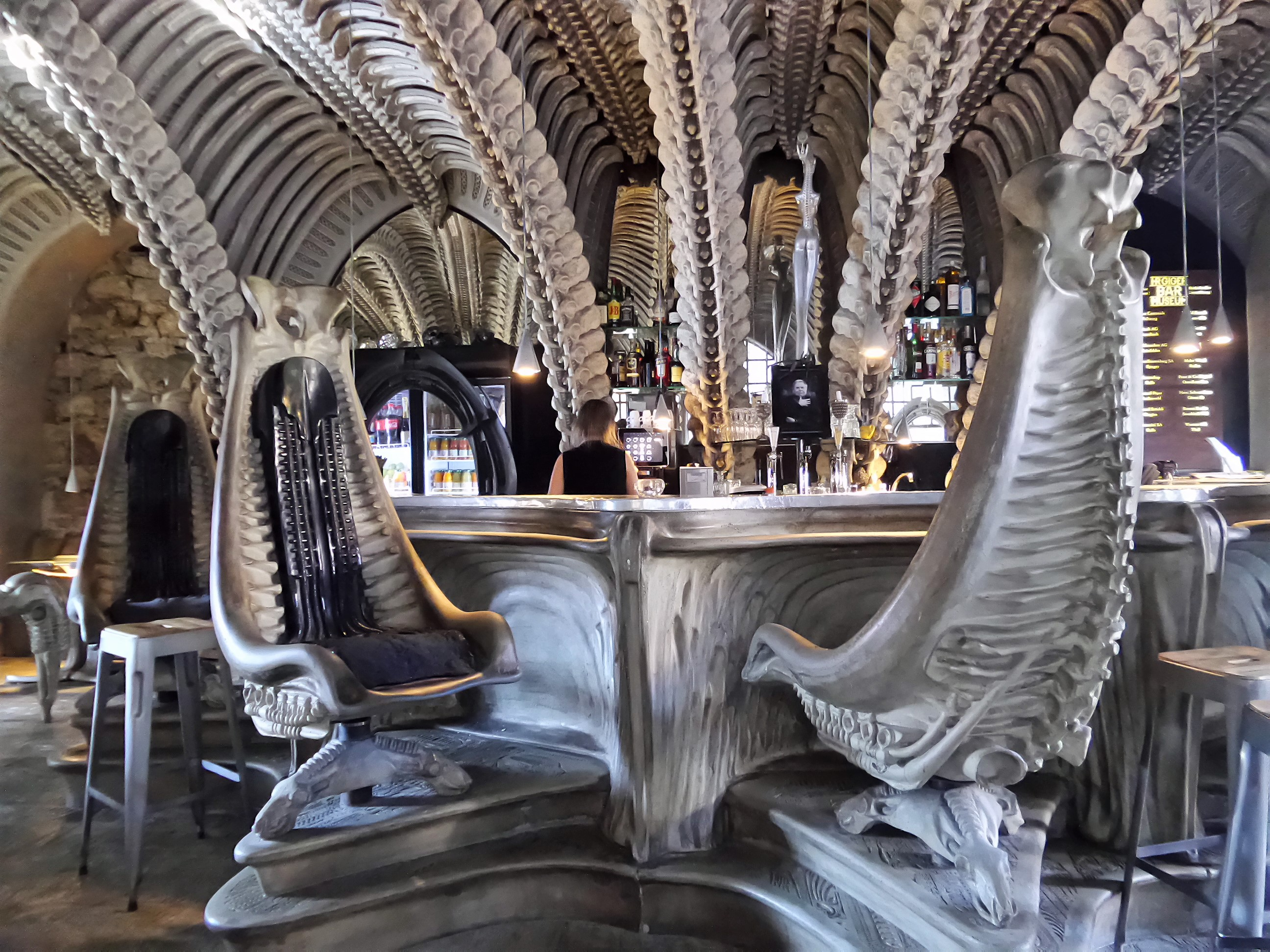 HR Giger Museum Bar, Rue du Château 2, 1663 Greyerz, Schweiz